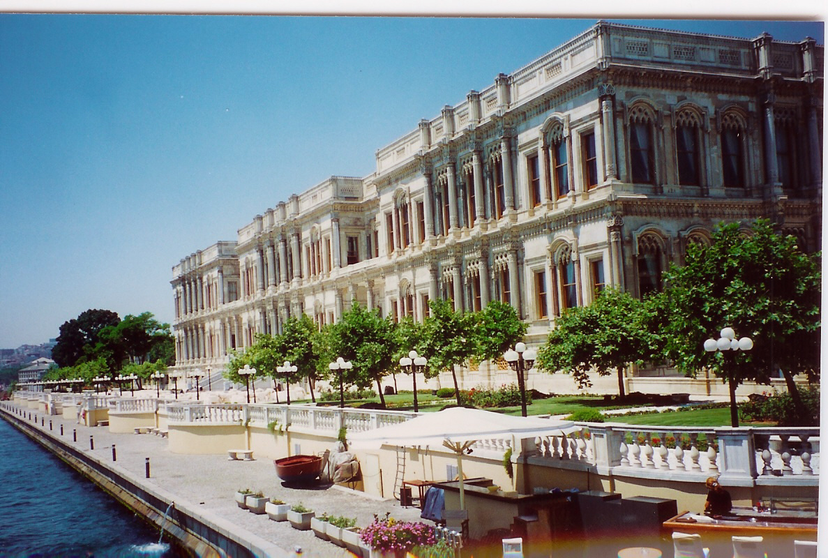 Ciragan Palace (Hotel Kempiski) zu Istanbul.